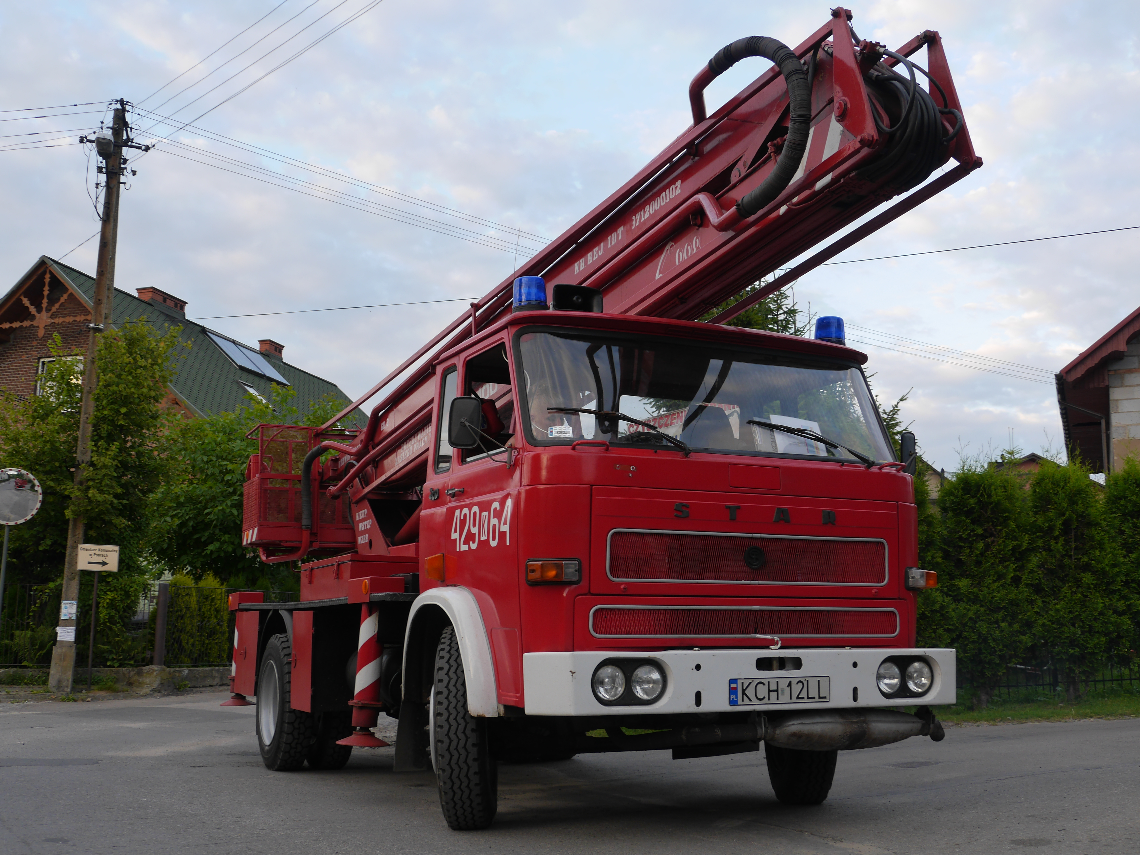 OSP Psary This photo was taken with Panasonic Lumix DMC-GH3 camera, thanks to Panasonic.You can see all photographs in category: Taken with Panasonic Lumix DMC-GH3.